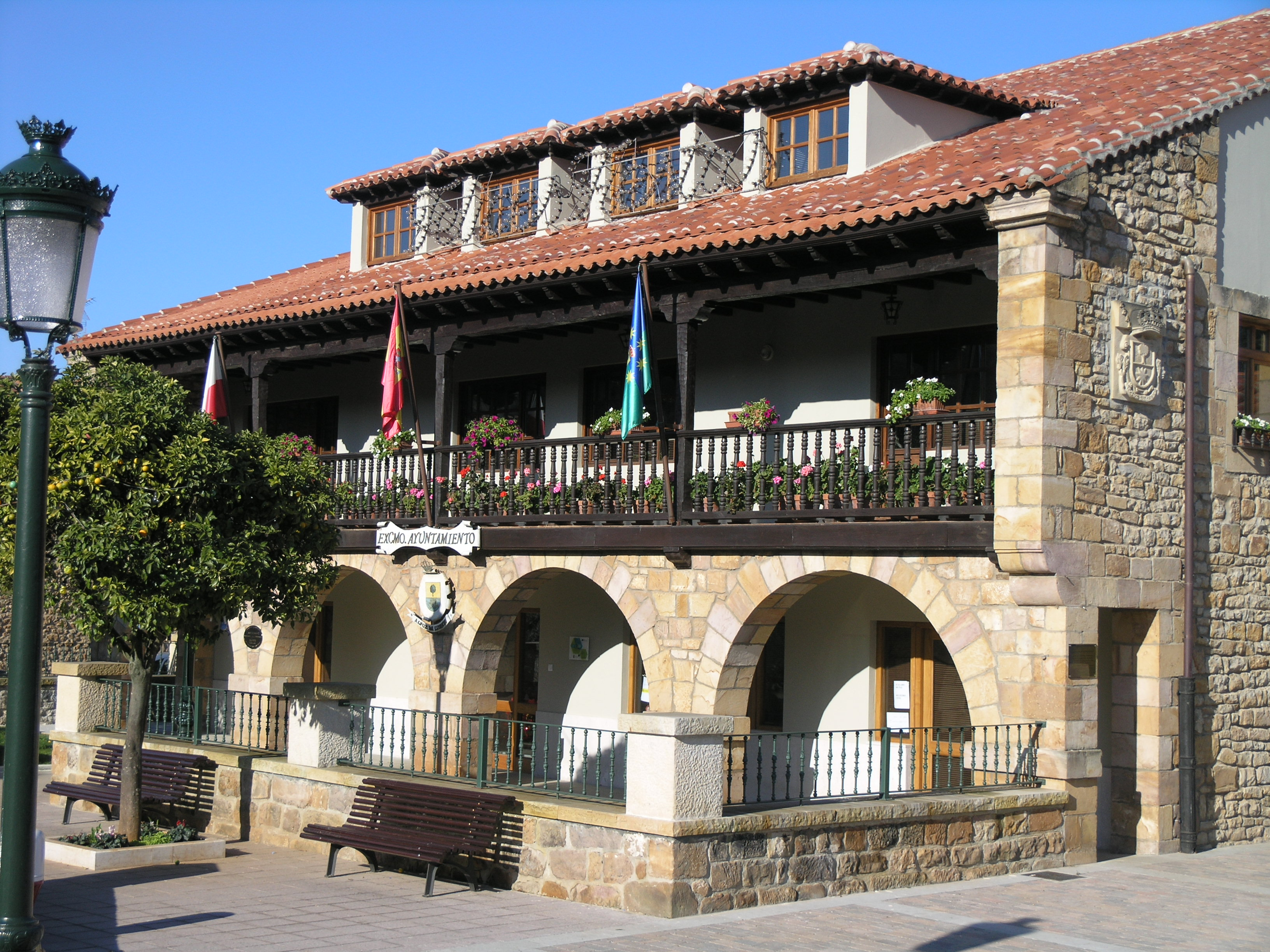 Ayuntamiento (Town Hall) de Alfoz de Lloredo, en Novales (Cantabria, España)